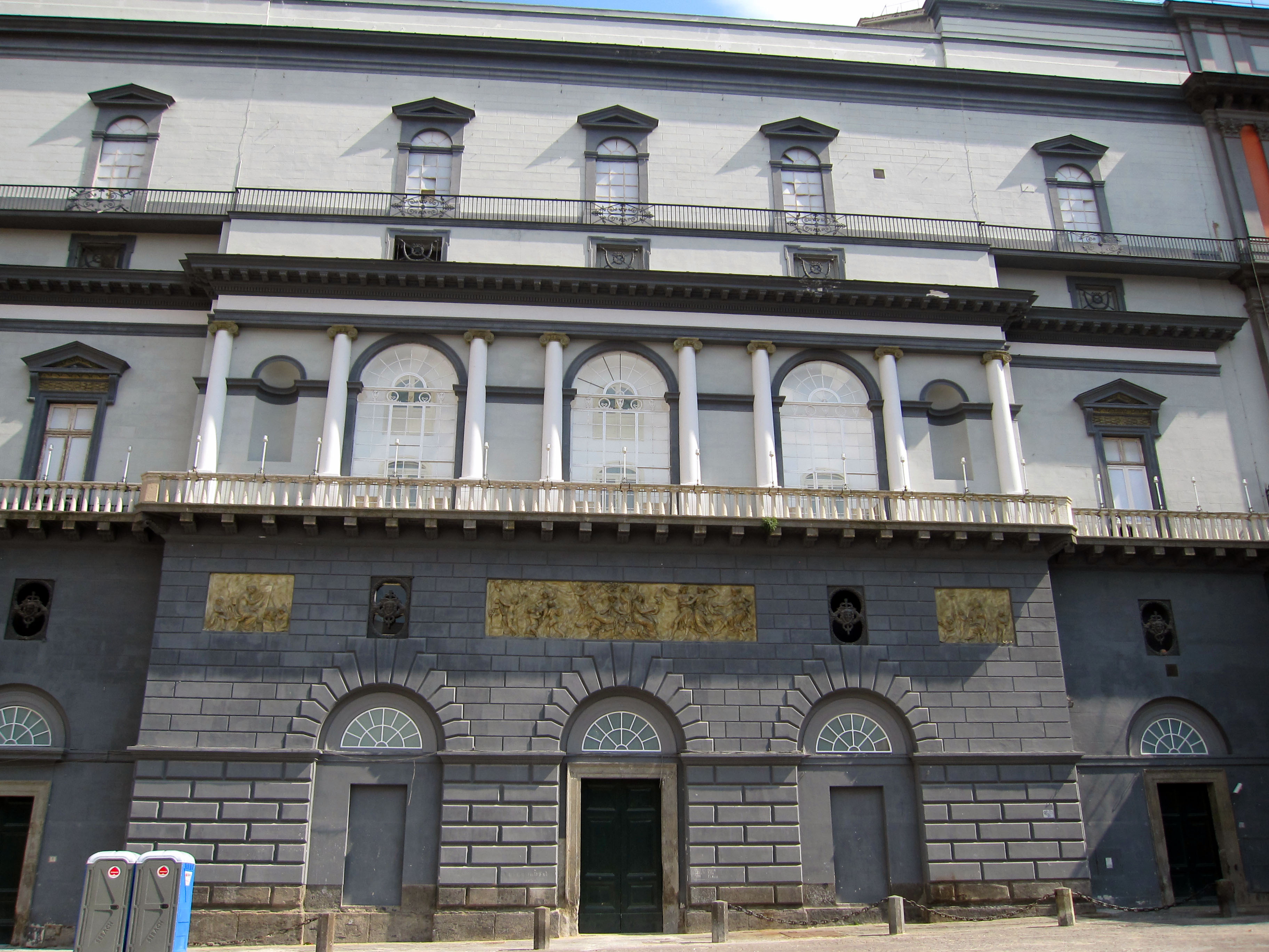 Napoli, Real Teatro San Carlo. Vista laterale da Piazza Trieste e Trento.